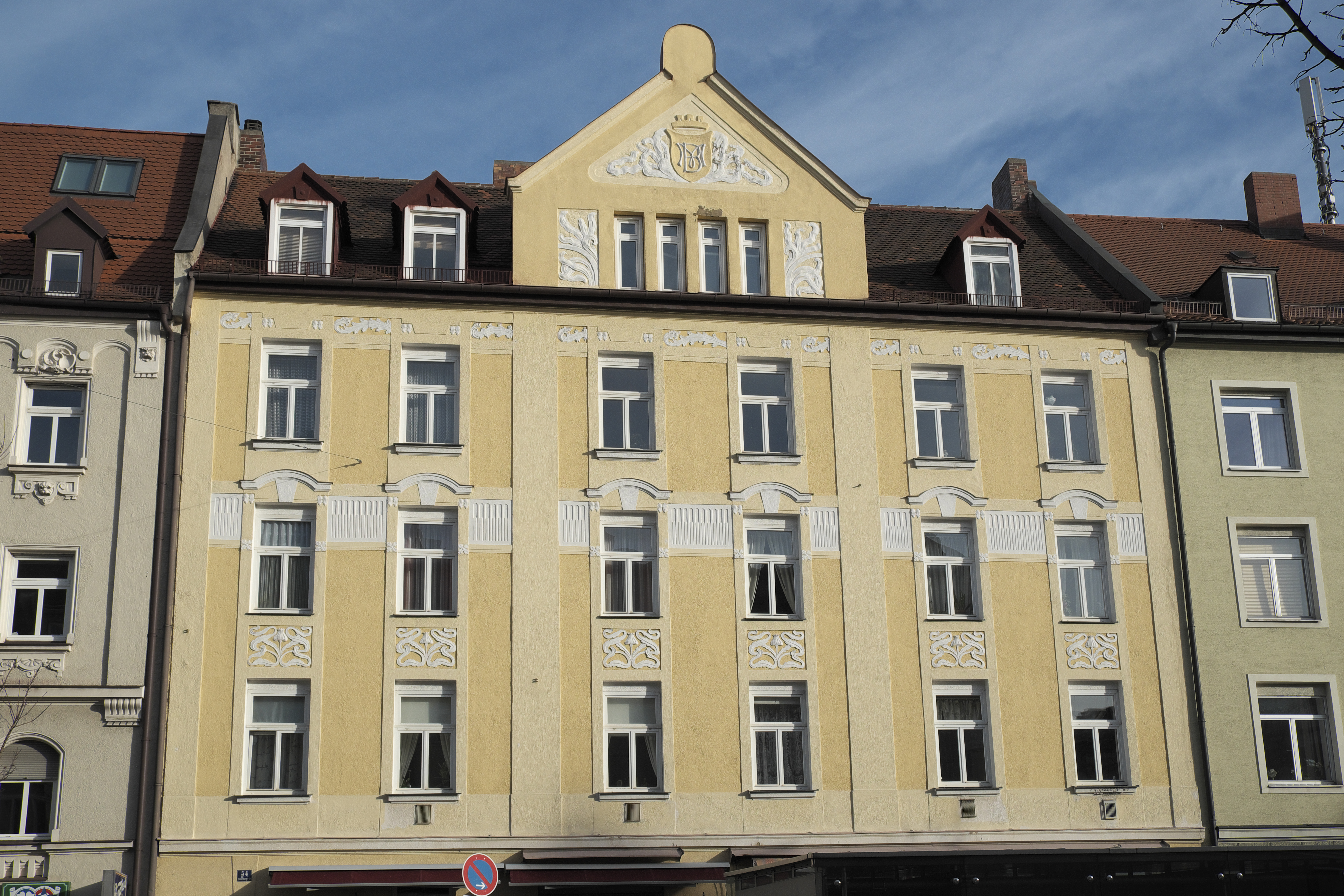 Mietshaus in der Donnersbergerstraße 54 in Neuhausen im Stadtbezirk Neuhausen-Nymphenburg in München (Bayern/Deutschland), aus dem frühen 20. Jahrhundert